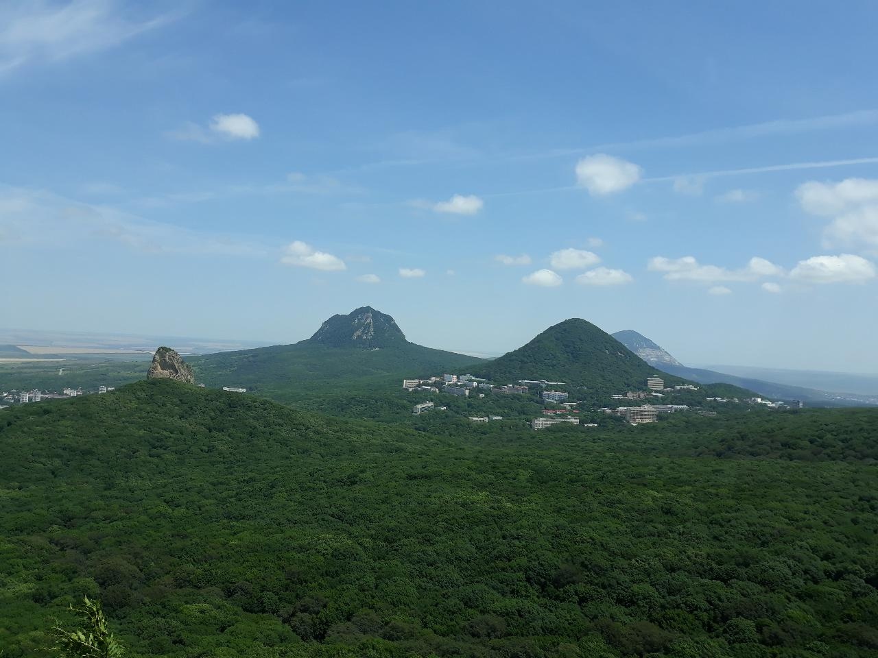 Поход на горы Медовая и Кабанка, 15.06.2019